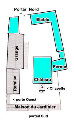 Plan de la ferme d'Hougoumont suivant un canevas de F. Bonaert, Patrimoine monumental de la Belgique – Brabant-Nivelles – Liège, Soledi, 1974, p. 69, fig. V : Braine-l’Alleud. Ferme de Goumont. Plan-masse.